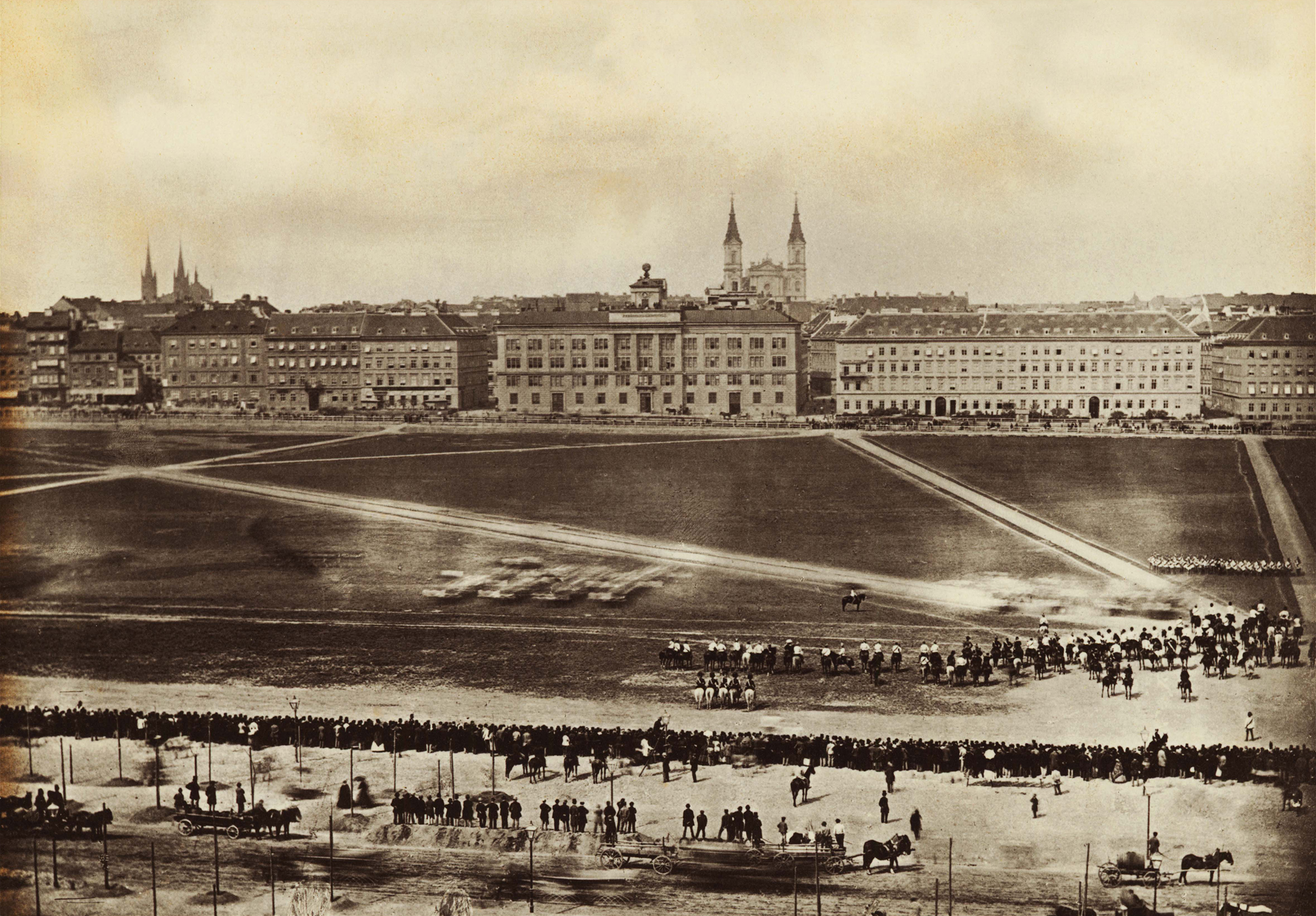 Paradeplatz am Josefstädter Glacis, Salzpapier-Abzug, in Bildmitte das Militärgeographische Institut, dahinter die Piaristenkirche, links hinten die Altlerchenfelder Pfarrkirche. Militärparade anlässlich des 30. Geburtstages von Kaiser Franz Joseph am 18. August 1860.